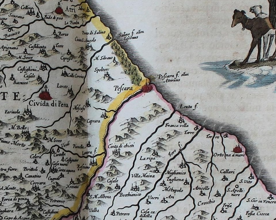 Descripción bibliográfica: Geographia Blaviana. - [Amsterdam : Juan Blaeu, 1659] . - [32], VI, 96 p., 34 f., h. 35a, 35b, 35c, 35d, 36-44 f., 34, [2], 36-40, [2], 43-70 [i. e. 75], [1] f., [20] p. de map., [9] f. de map., [4] f. pleg. de map., [2] f. de plan., [2] f. ge grab. : |bil. ; |cFol. marca major (57 cm.) . - En la dedicatoria a Felipe IV: "Presenta ... El Atlas Universal y Cosmographico de los orbes y terrestre ... Juan Blaeu" . - Título tomado del frontispicio. -- Privilegio fechado en 1659. -Errores de pag. - Sign.: 1, *2, **3, ***-****2, a-e2, A-I2, K1, L-Z2, Aa-Dd2, 4 2, Ee-Ff2, A-I2, K1, L2, M1, N-Y2, Z5, Aa-Dd2, Ee1, A-D2, E-F1, G-I2, K-L1, M-O2, P1, Q-Z2, Aa-Bb2, Cc1, Dd3, Ff-Zz2, Aaa-Bbb2, . - Frontispicio grab. col. -- Incluye un total de 49 il. entre map., plan. i grab. Materia: Atlas - Obras anteriores a 1800 Impresor: Blaeu, Joan, 1596-1673, imp. Lugar de impresión: Holanda. Amsterdam Localización: Vea la ilustración en su contexto Visite también la exposición "Cartografía histórica en la Biblioteca de la Universidad de Sevilla" This is a cropped version, showing the area around Pescara.